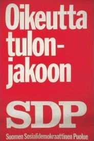 Vuoden 1972 vaalijuliste